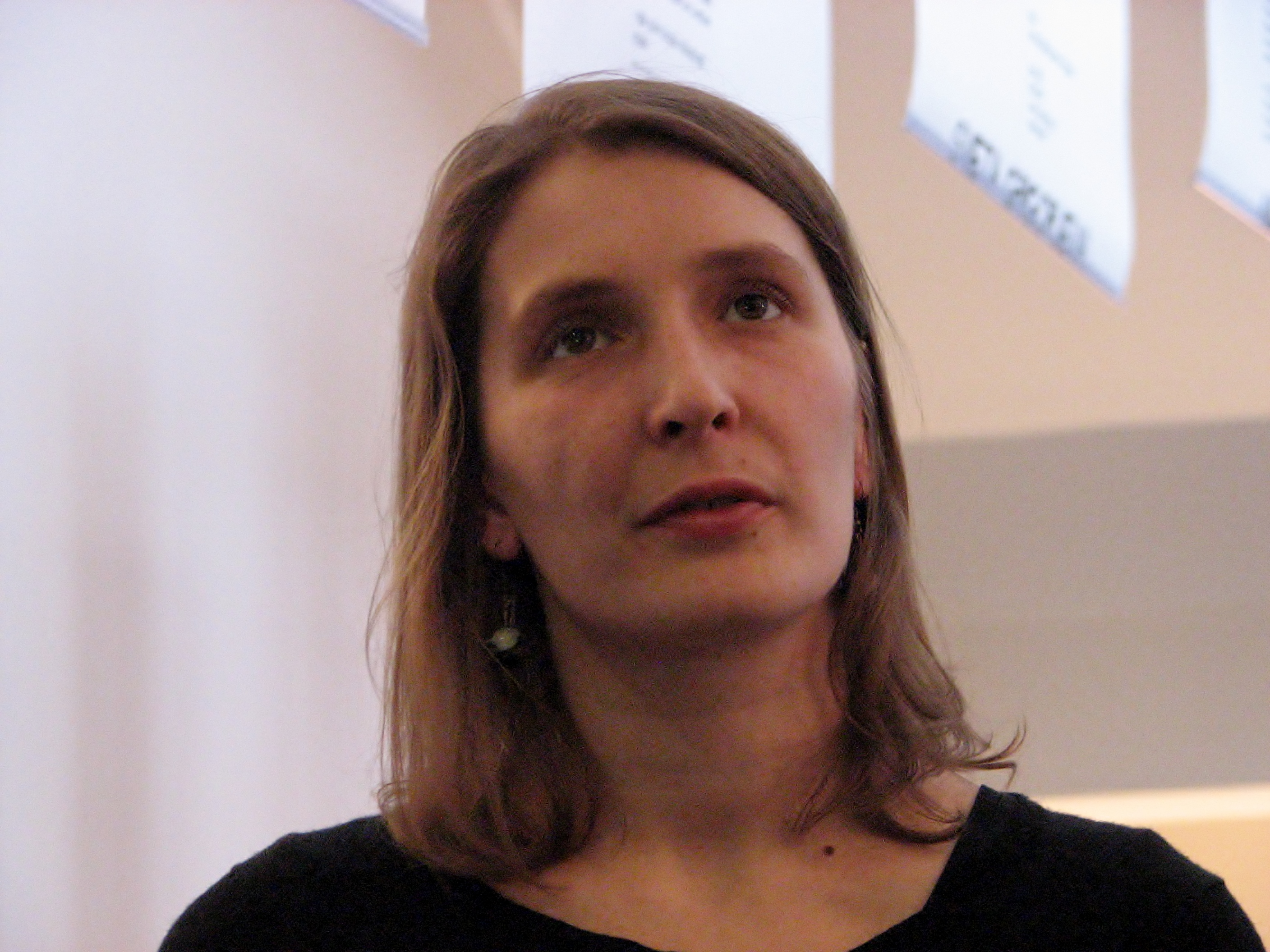 Carolina Pihelgas esinemas rahvusvahelise luulepäeva luulemaratonil Tallinna Keskraamatukogus 21. märtsil 2014